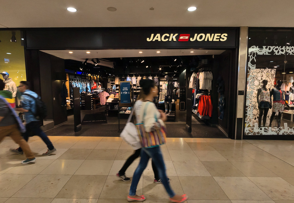 Boutique / Store in Dresden, Altmarkt-Galerie, Mai 2014